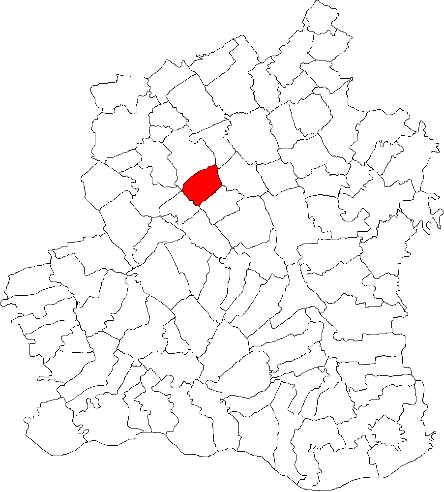 Categorie:Hărţi ale judeţului Teleorman